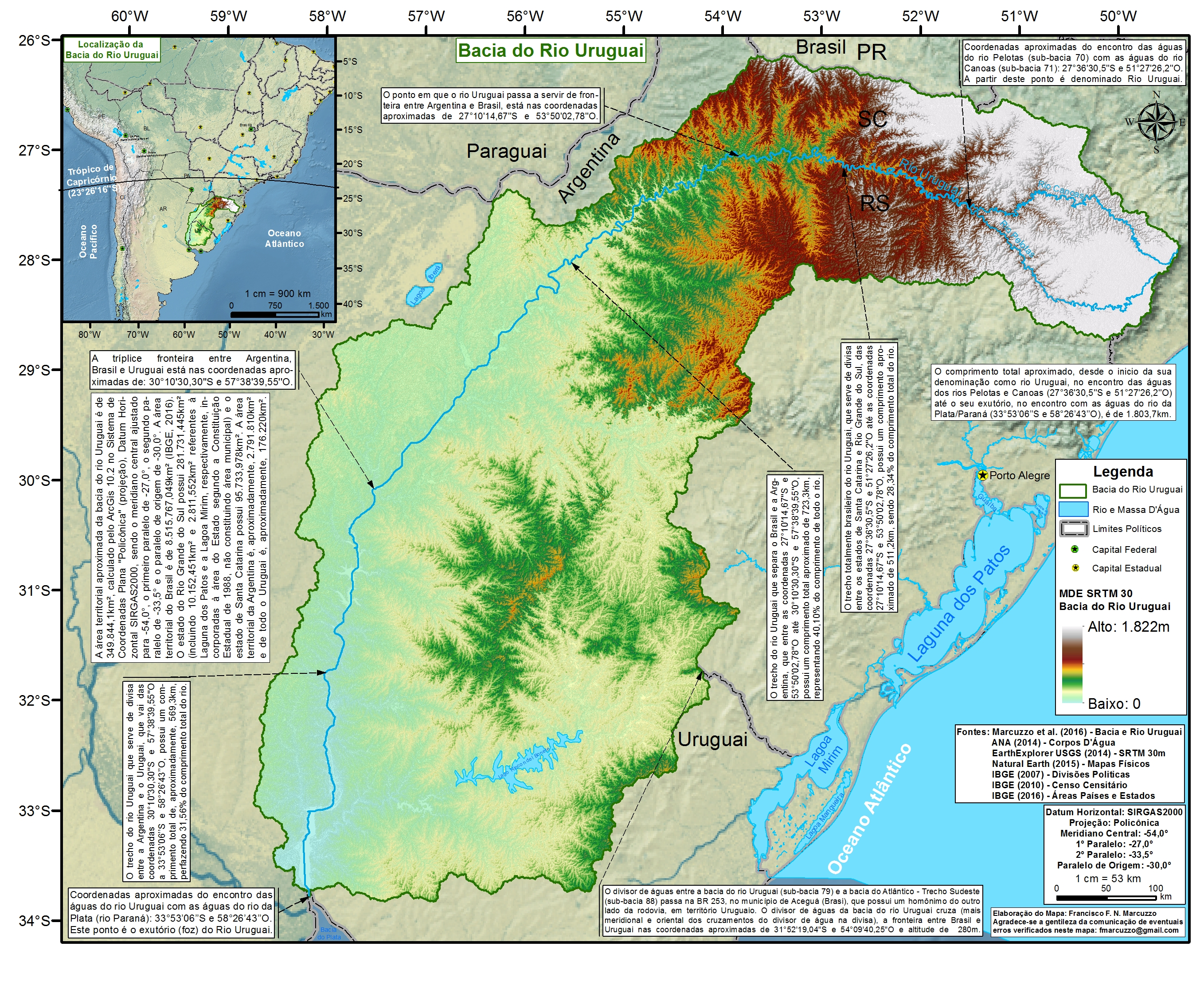 Bacia Rio Uruguai Locali MDE